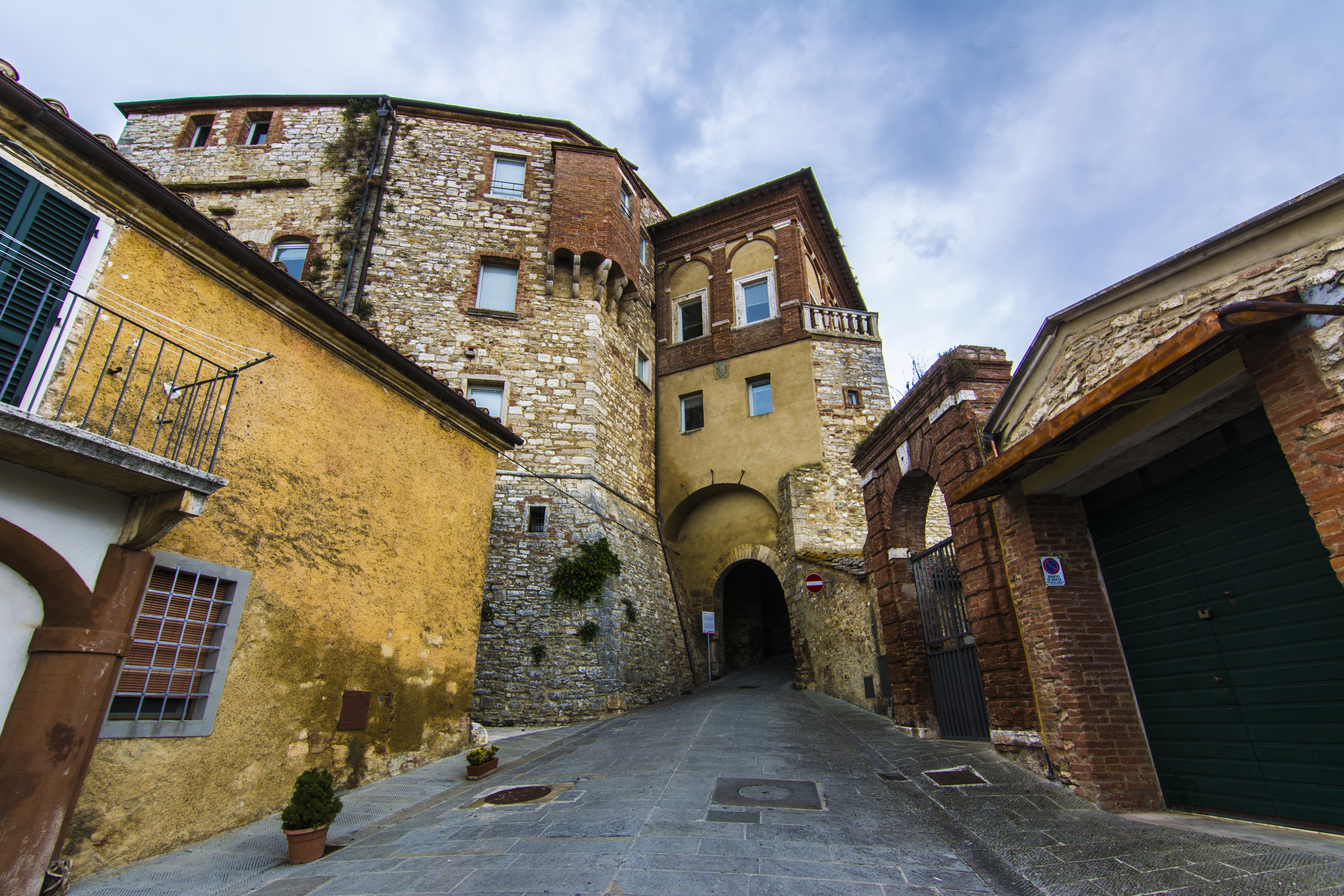 Porta San Lorenzo This is a photo of a monument which is part of cultural heritage of Italy.